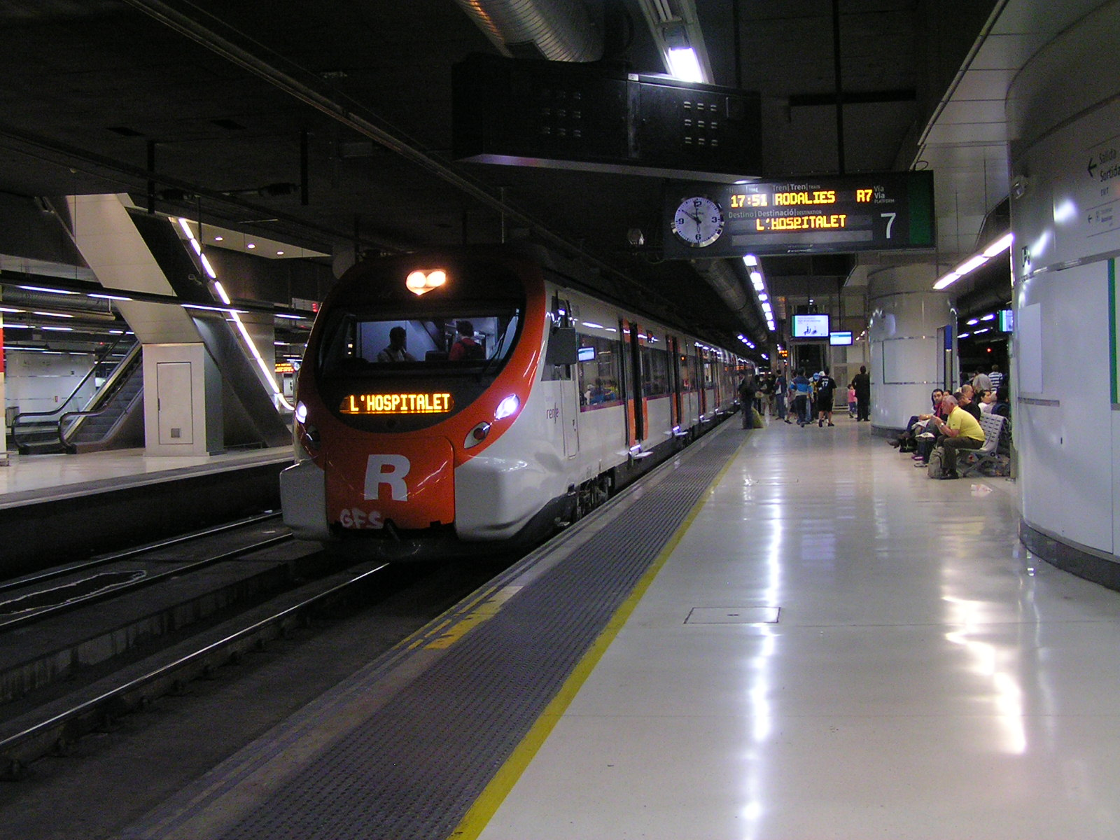 Un automotor eléctrico Civia con los colores de RdC con destino a L'Hospitalet en la estación de Barcelona Sants.